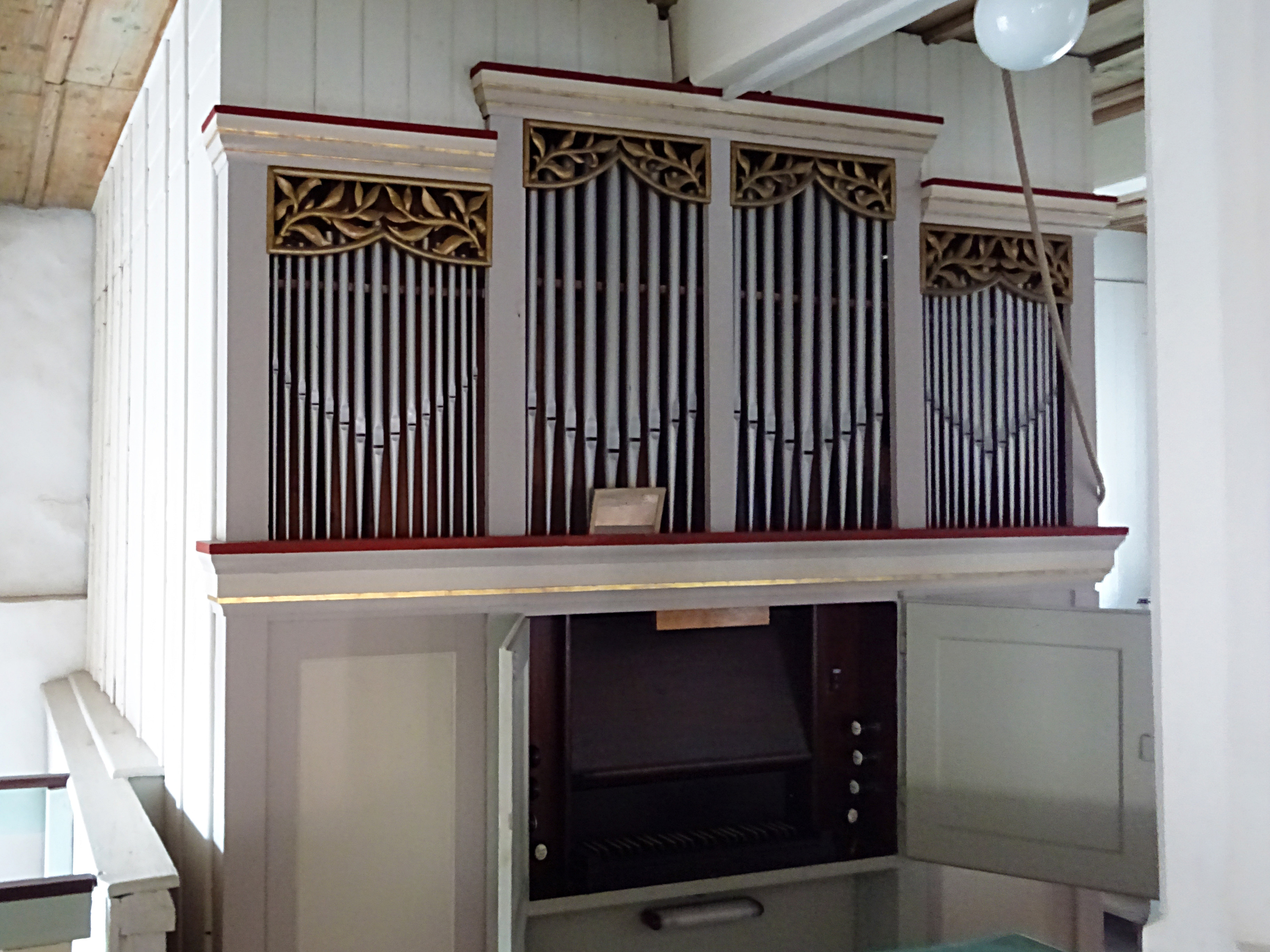 Orgel von Gottlieb Knauf (1845, I/P 7) in der Rosenkirche St. Marien (Elende)[1]